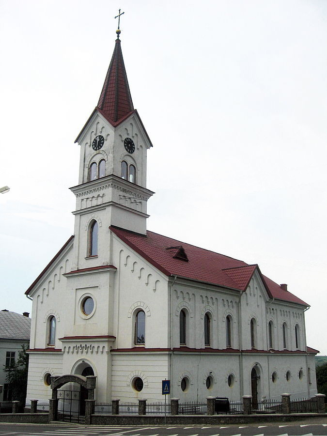 Biserica Adormirea Maicii Domnului din Ilișești, Suceava County, Romania, fostă biserică evanghelică